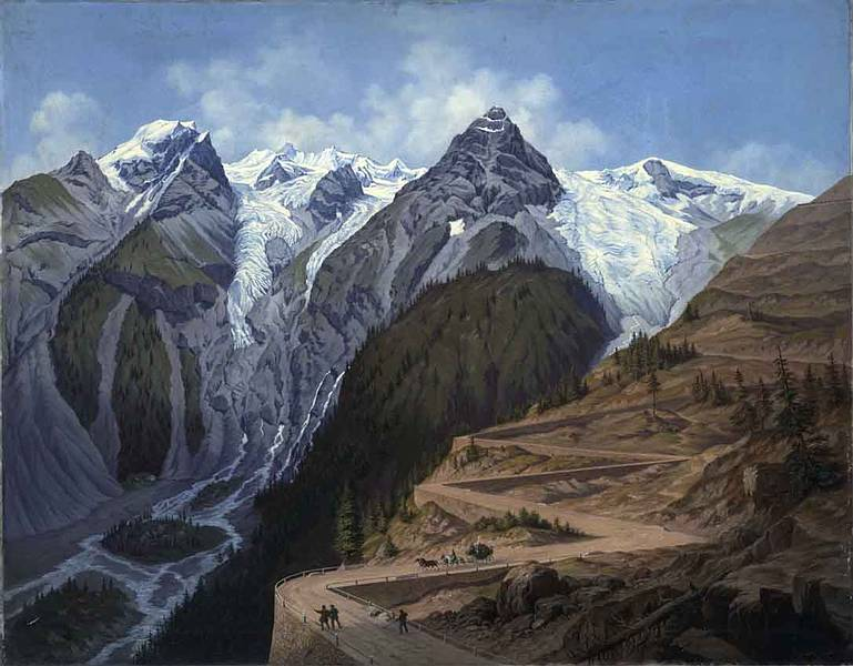 Die Kunststraße über das Stilfserjoch mit dem Ortler, 1861, 100 x 128,5 cm. Salzburg Museum; Inv.-Nr. 7012/49